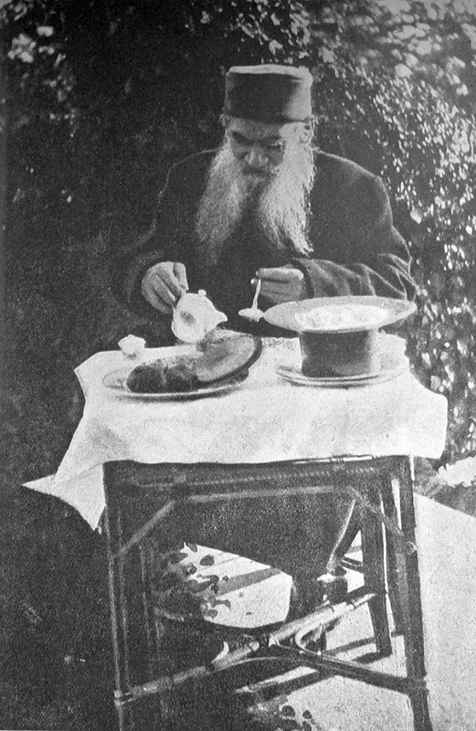 Lev Tolstoj fa una colazione vegetariana nella sua tenuta di Jasnaja Poljana.